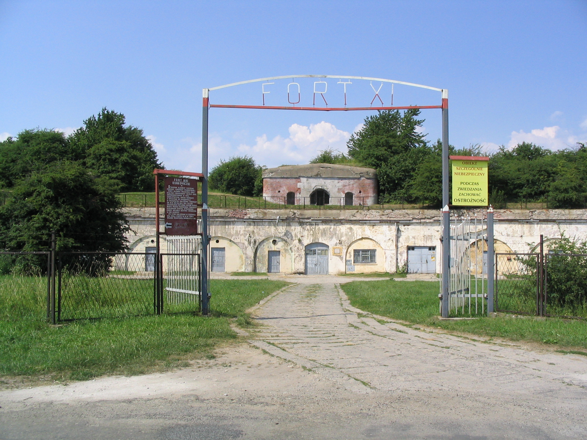 Fort XI "Duńkowiczki" Author: Goku122